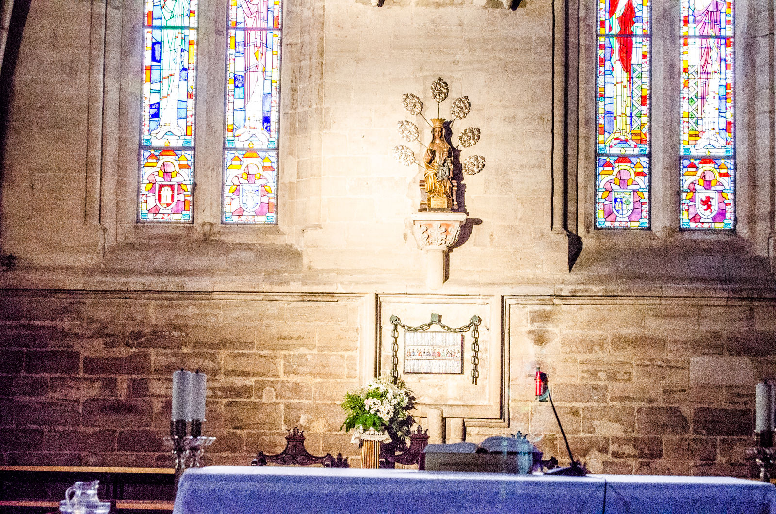 Iglesia de Santa María la Real y Antigua de Gamonal (Burgos - España). Imagen de la Virgen.